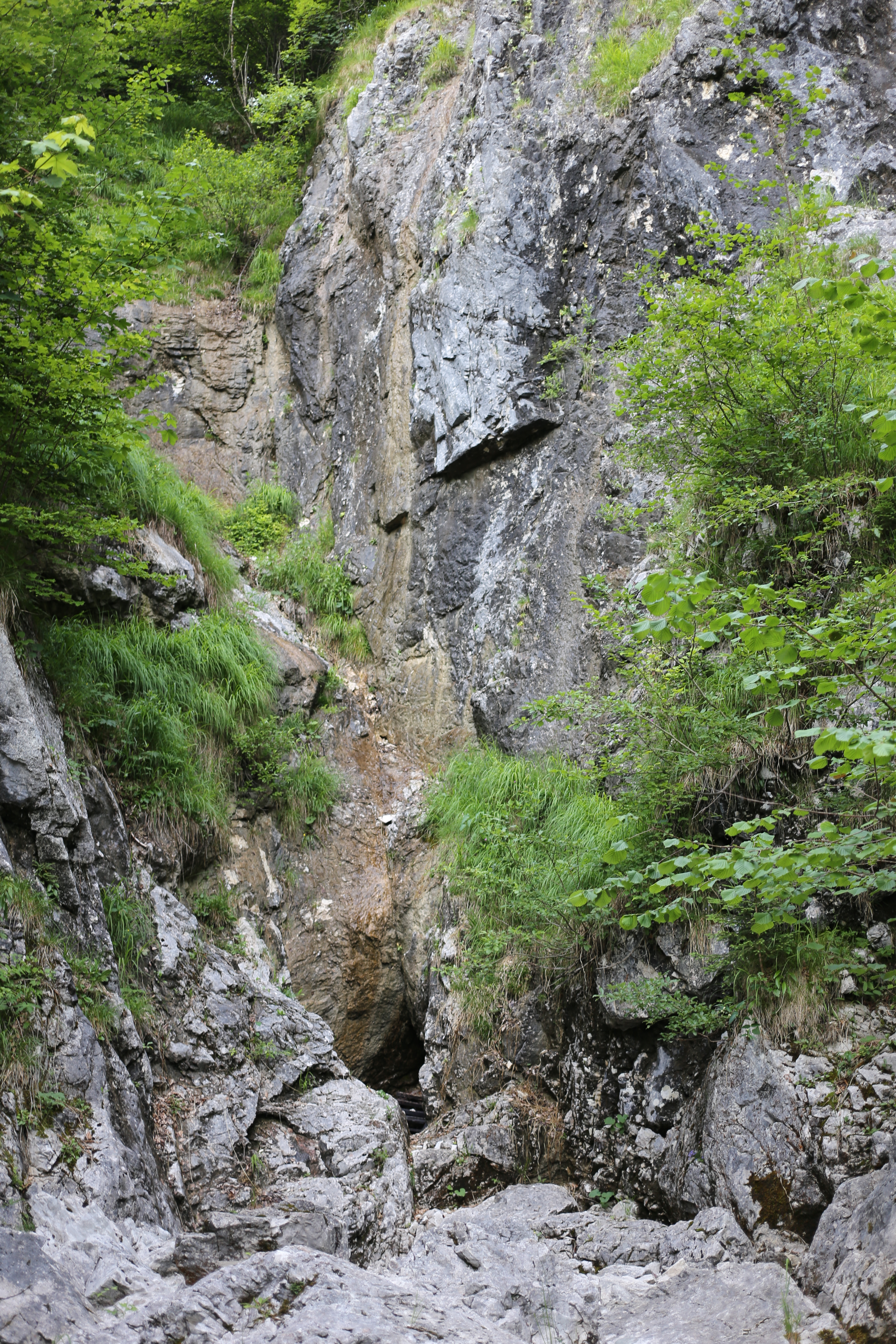 Rettenbachhöhle This media shows the natural monument in Upper Austria with the ID nd598.